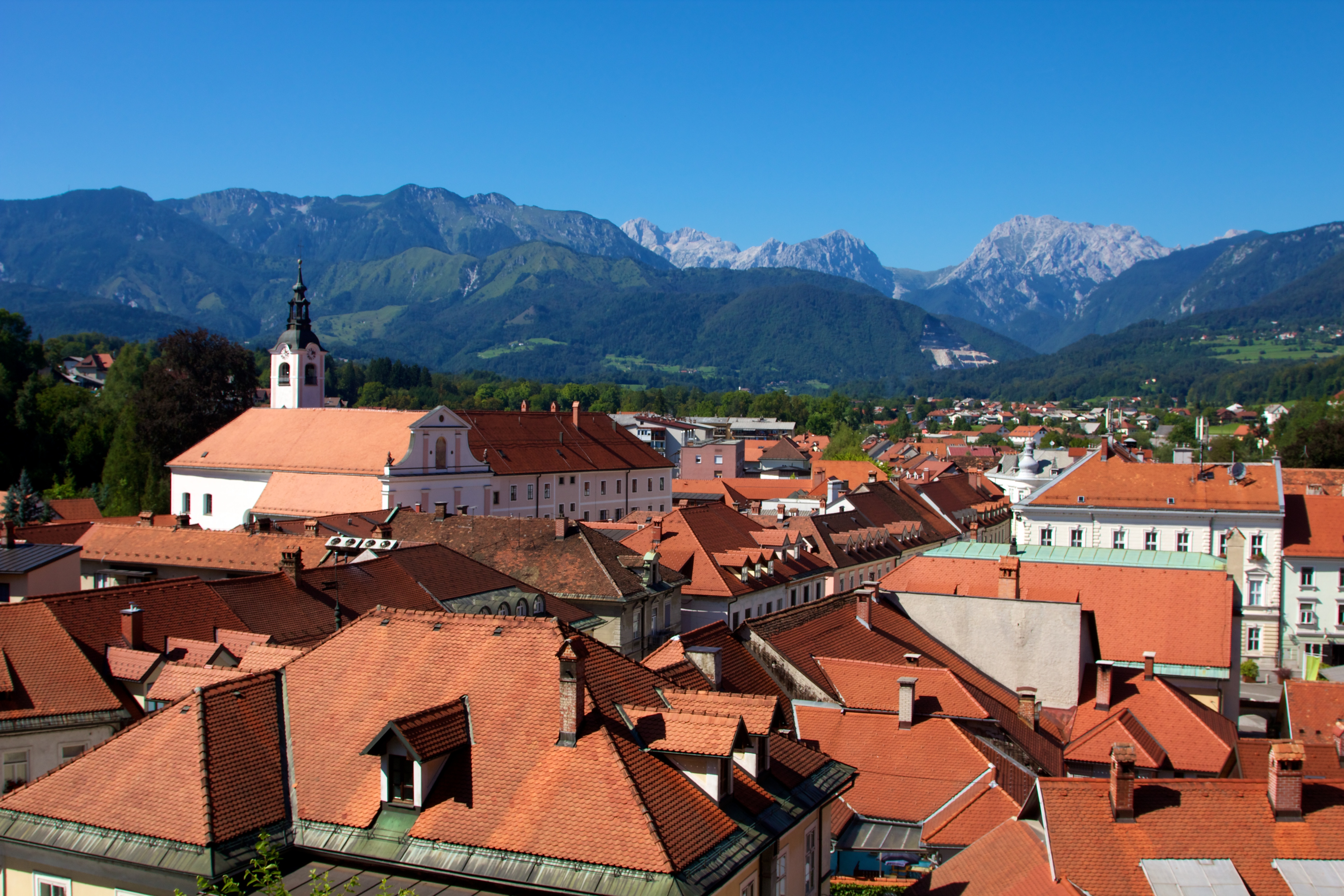 Kamnik 005